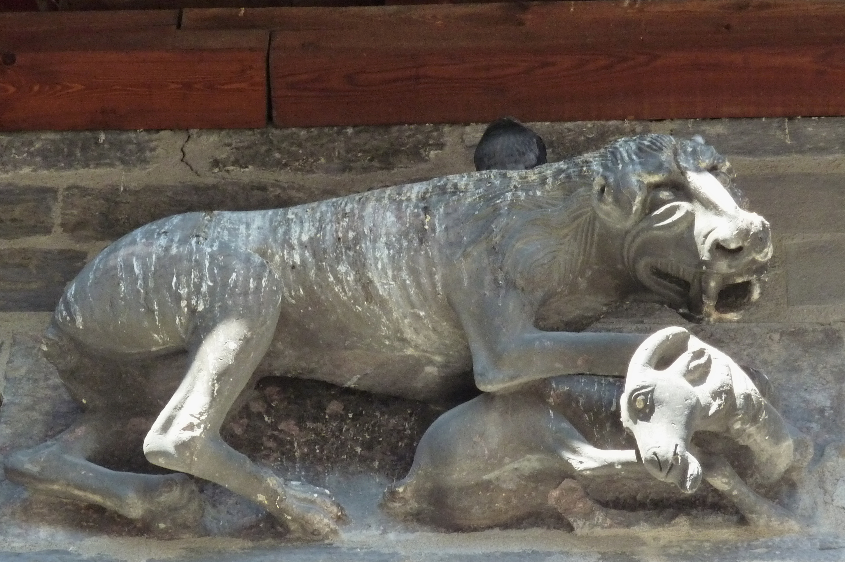 Maison des Chanonges in Embrun, einer Gemeinde im Département Hautes-Alpes in der französischen Region Provence-Alpes-Côte d'Azur, romanisches Haus aus dem 13. Jahrhundert, Relief eines Löwen, der eine Ziege verschlingt